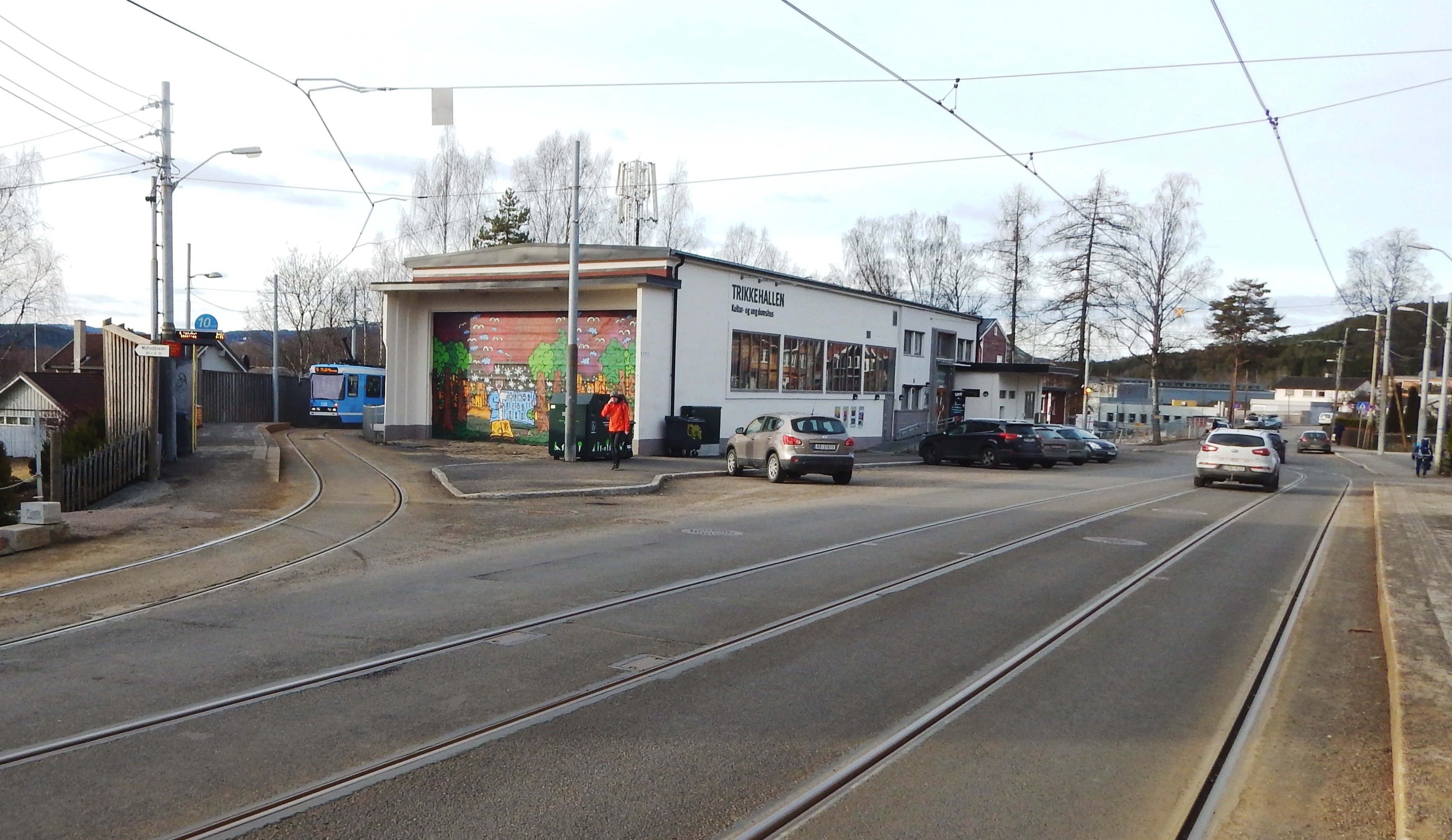 Trikkehallen i Midtoddveien 12 på Kjelsås